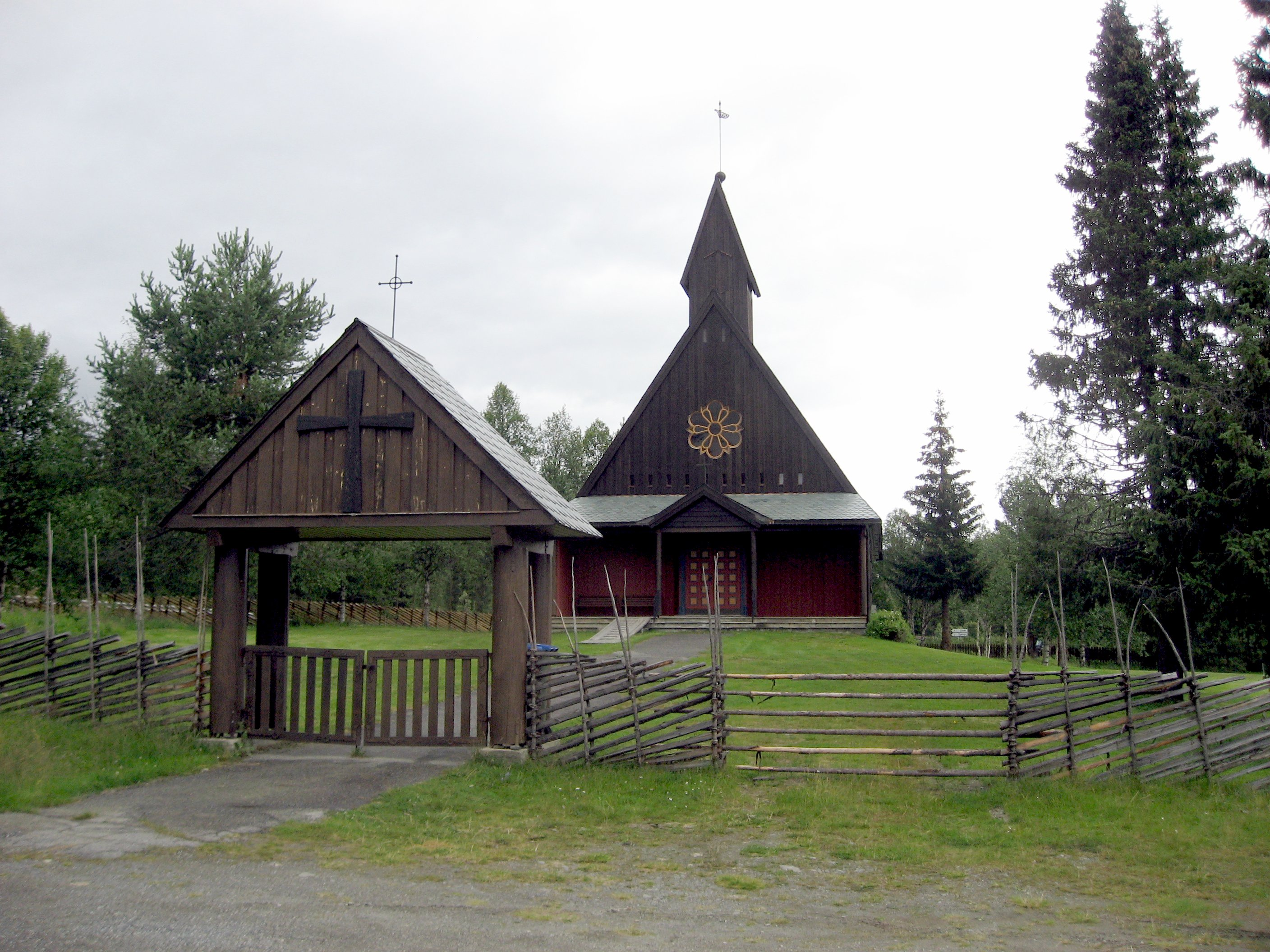 Tisleidalen kapell